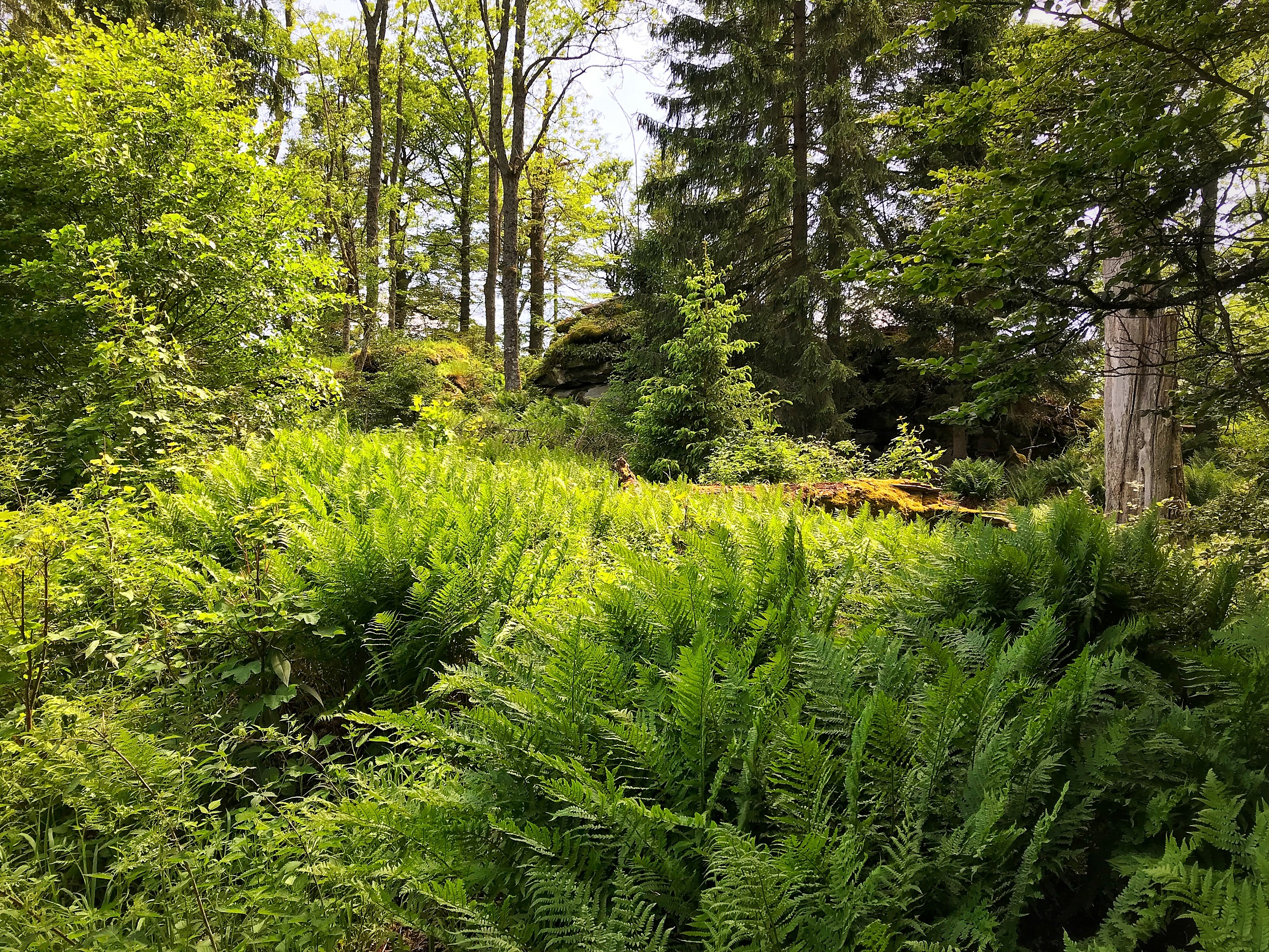 Černý les (1007 m) na Šumavě